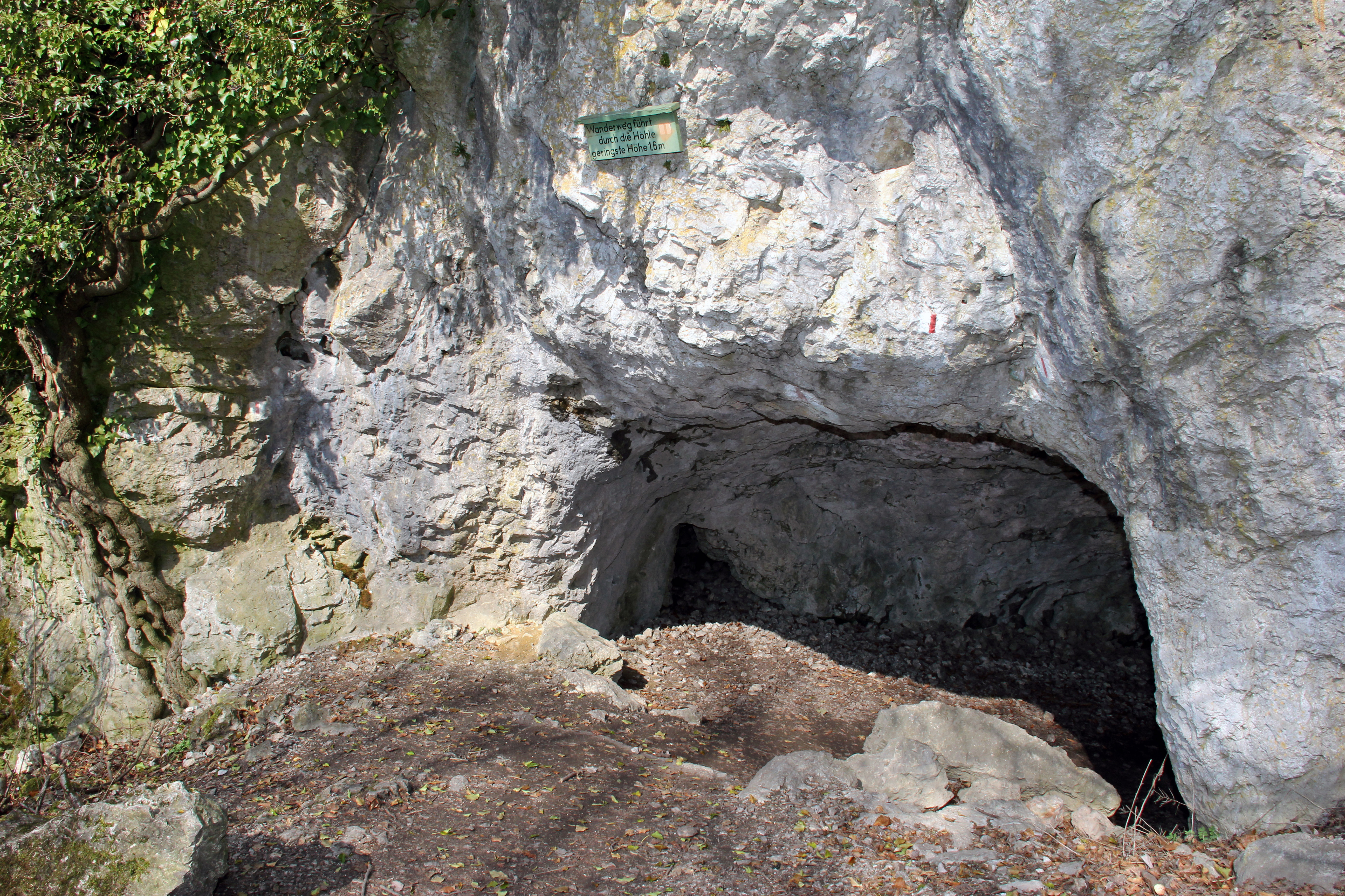 Oswaldhöhle, Südeingang